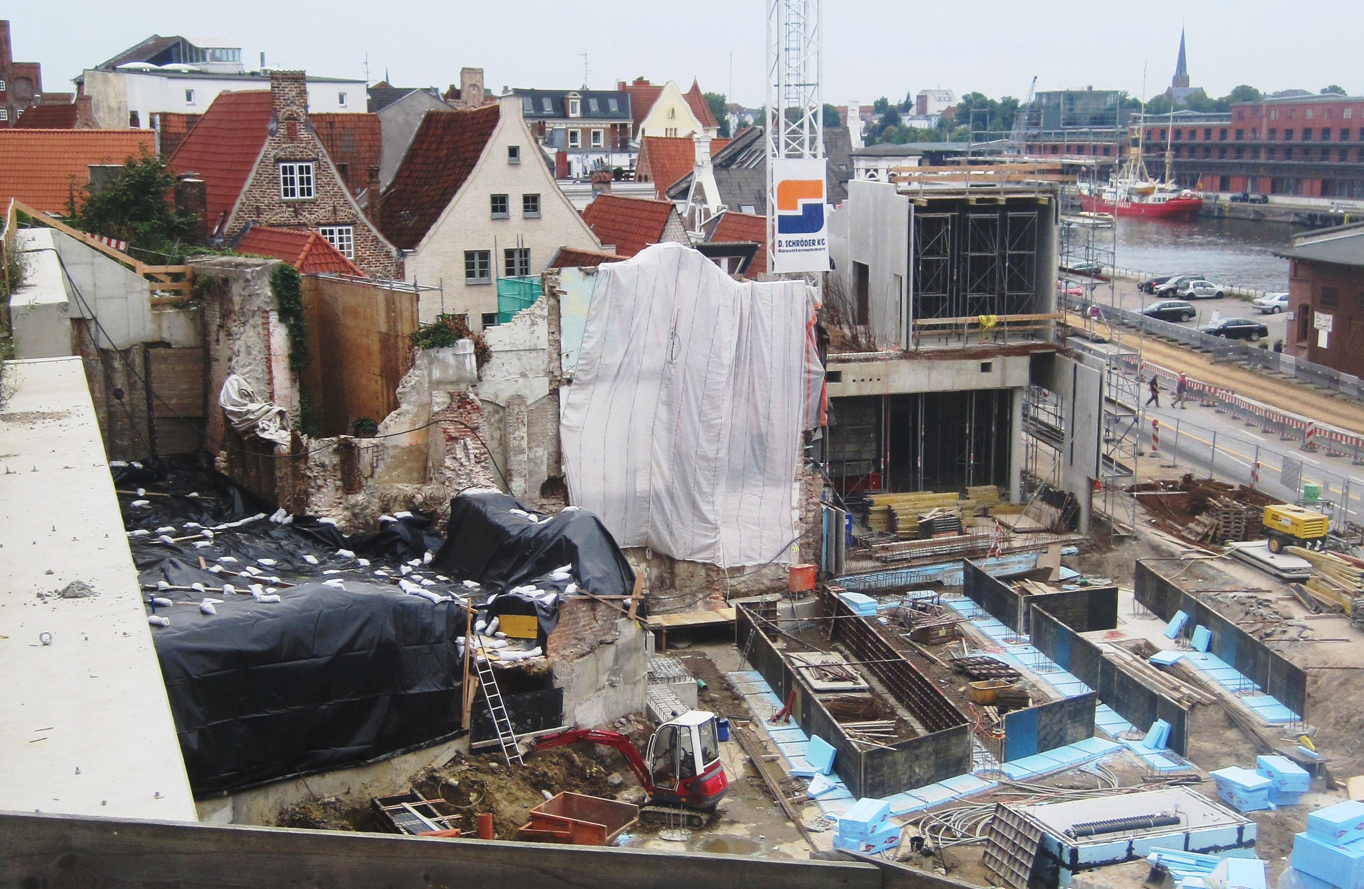 Baustelle des Europäischen Hansemuseums Lübeck mit denkmalgeschützten Resten mittelalterlicher Vorbebauung. (Beschnittene Version)